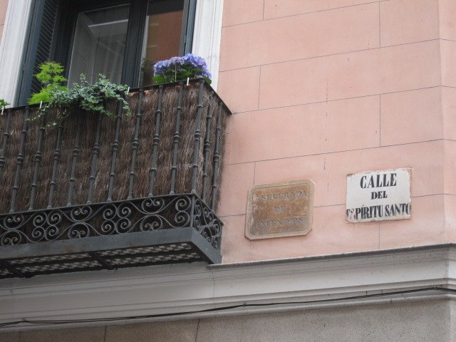 Espíritu Santo, Malasaña. Madrid